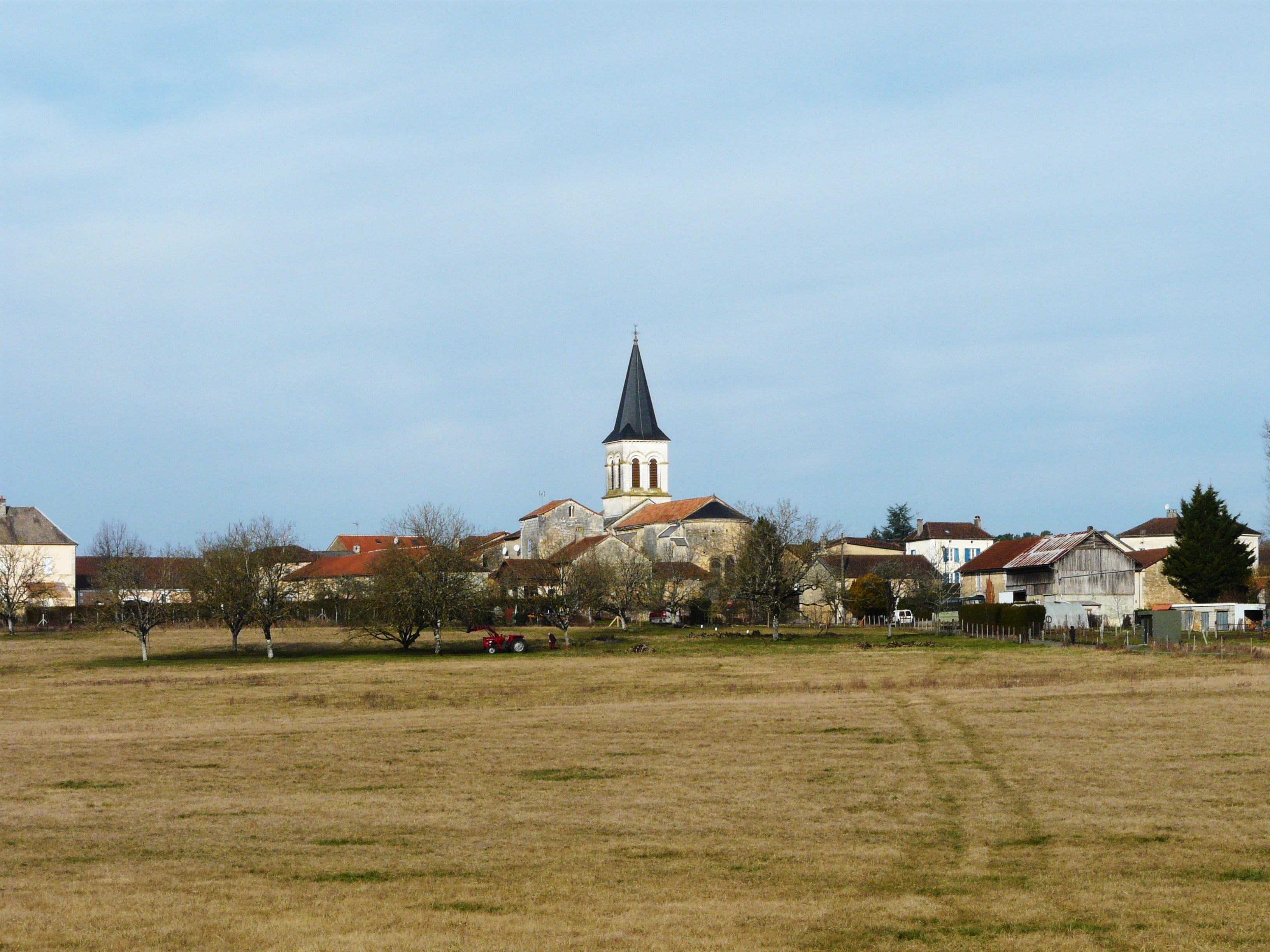 Le bourg de Négrondes, Dordogne, France